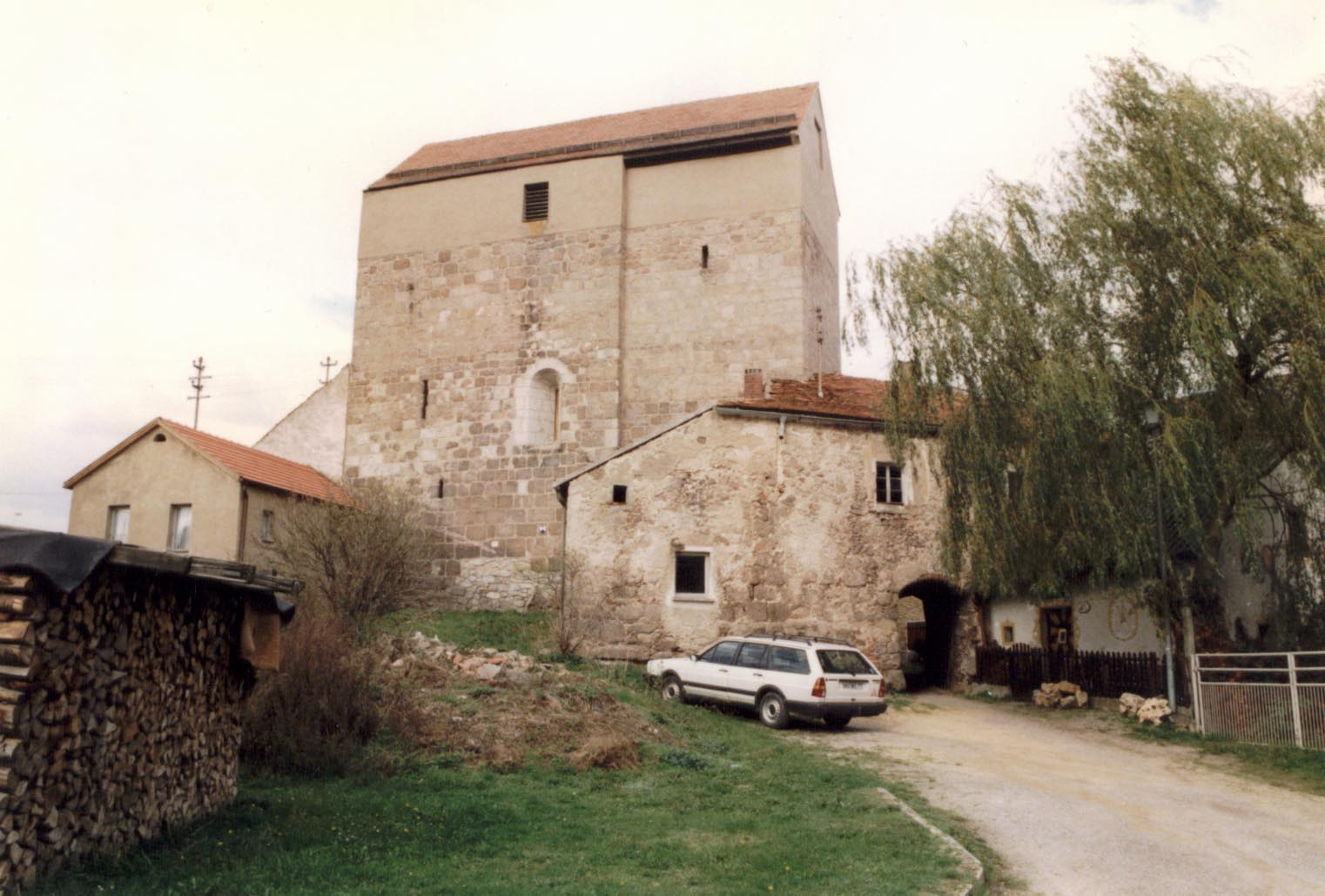 Burg Hof, Nordwestliche Seite des Kapellen-Wohnturmes